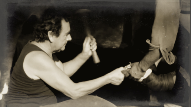 La foto fue tomada en el campo Hípico Barracas al Sur de Avellaneda, mientras realizaban cambio de herraduras a un caballo. Las herraduras para caballos son piezas en forma de una "U", construidas de hierro, caucho, plástico o cuero, que se clavan o se pegan en el borde de los cascos de los caballos. Las herraduras se utilizan para proteger los cascos y pezuñas contra el desgaste y la rotura.